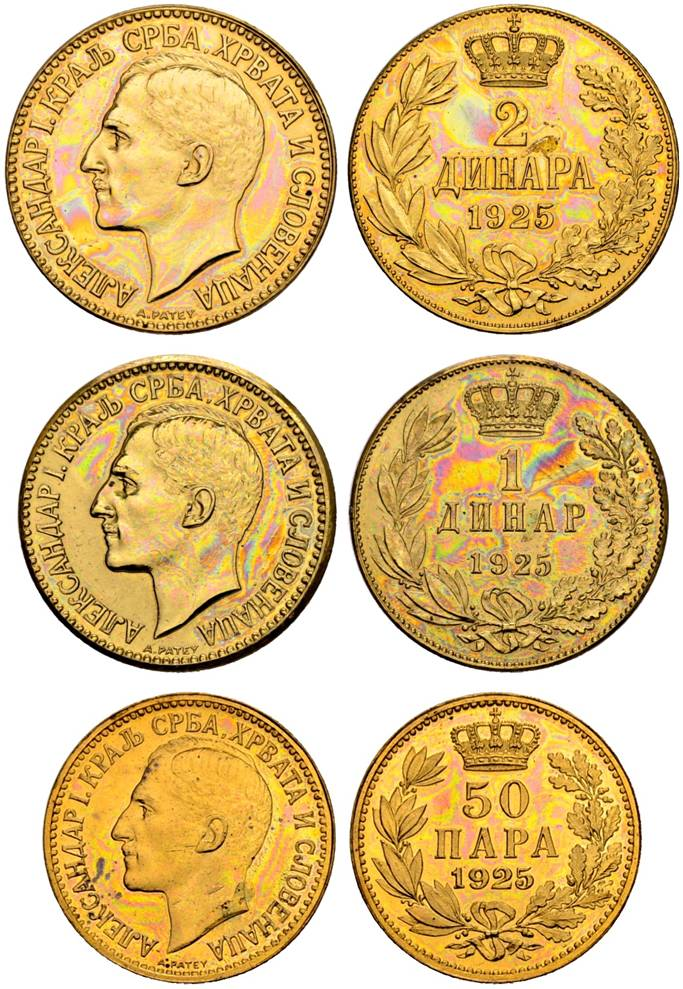 سکه های پادشاهی یوگسلاوی طراحی پاته